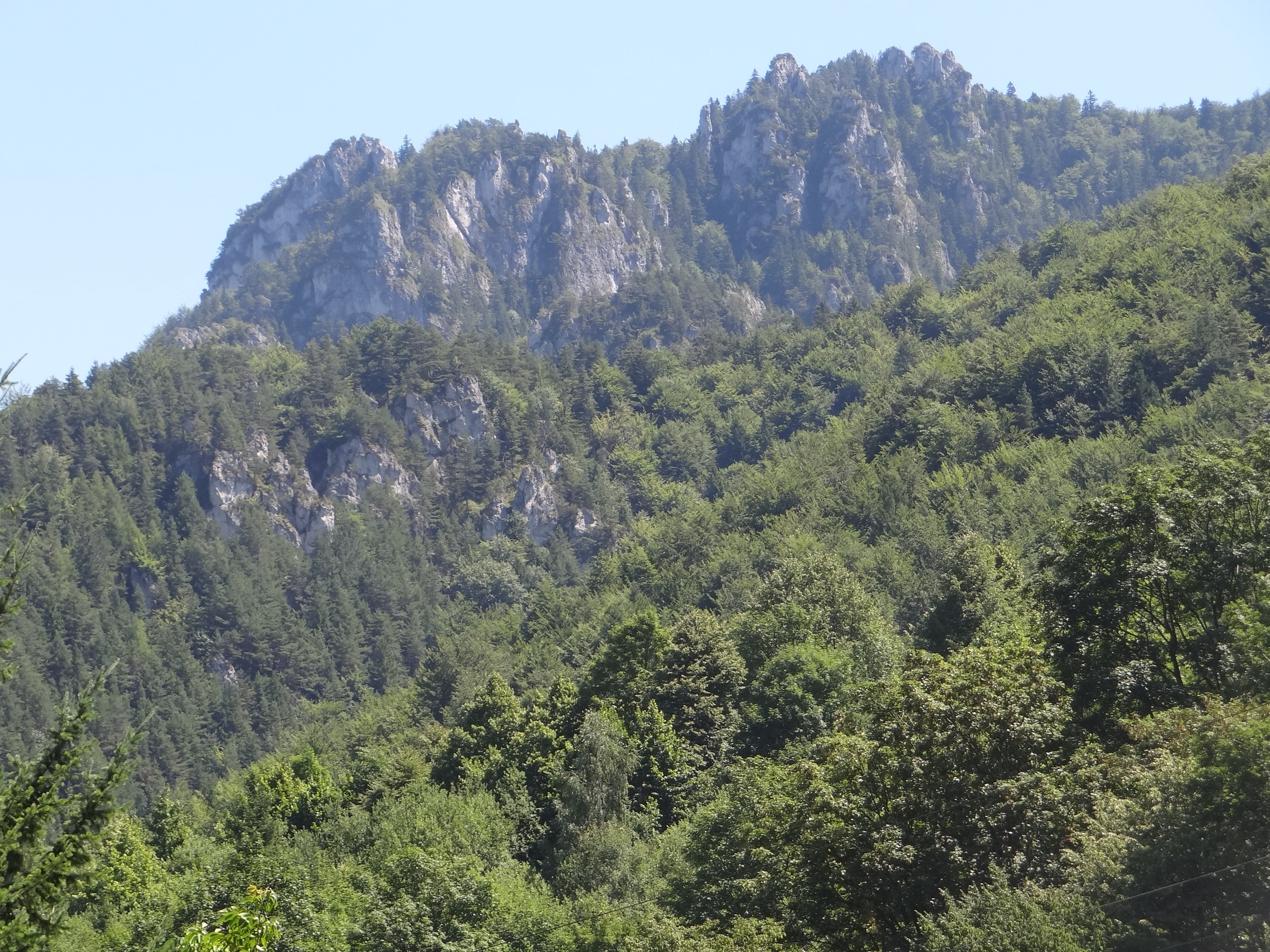 Sokolie